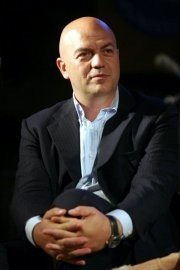 Marco Rizzo Licensing Rizzo, Marco